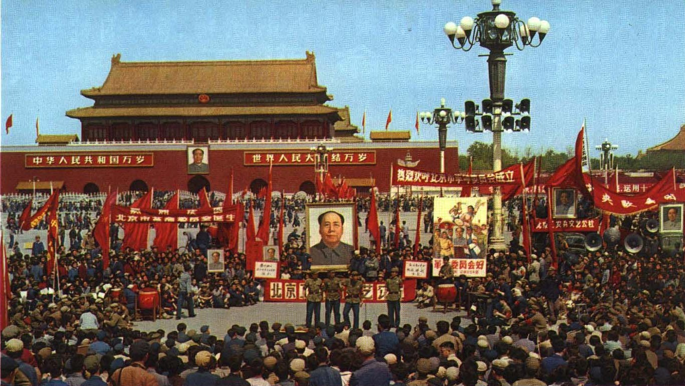 1967-07 1967年4月20日北京市革命委员会成立2